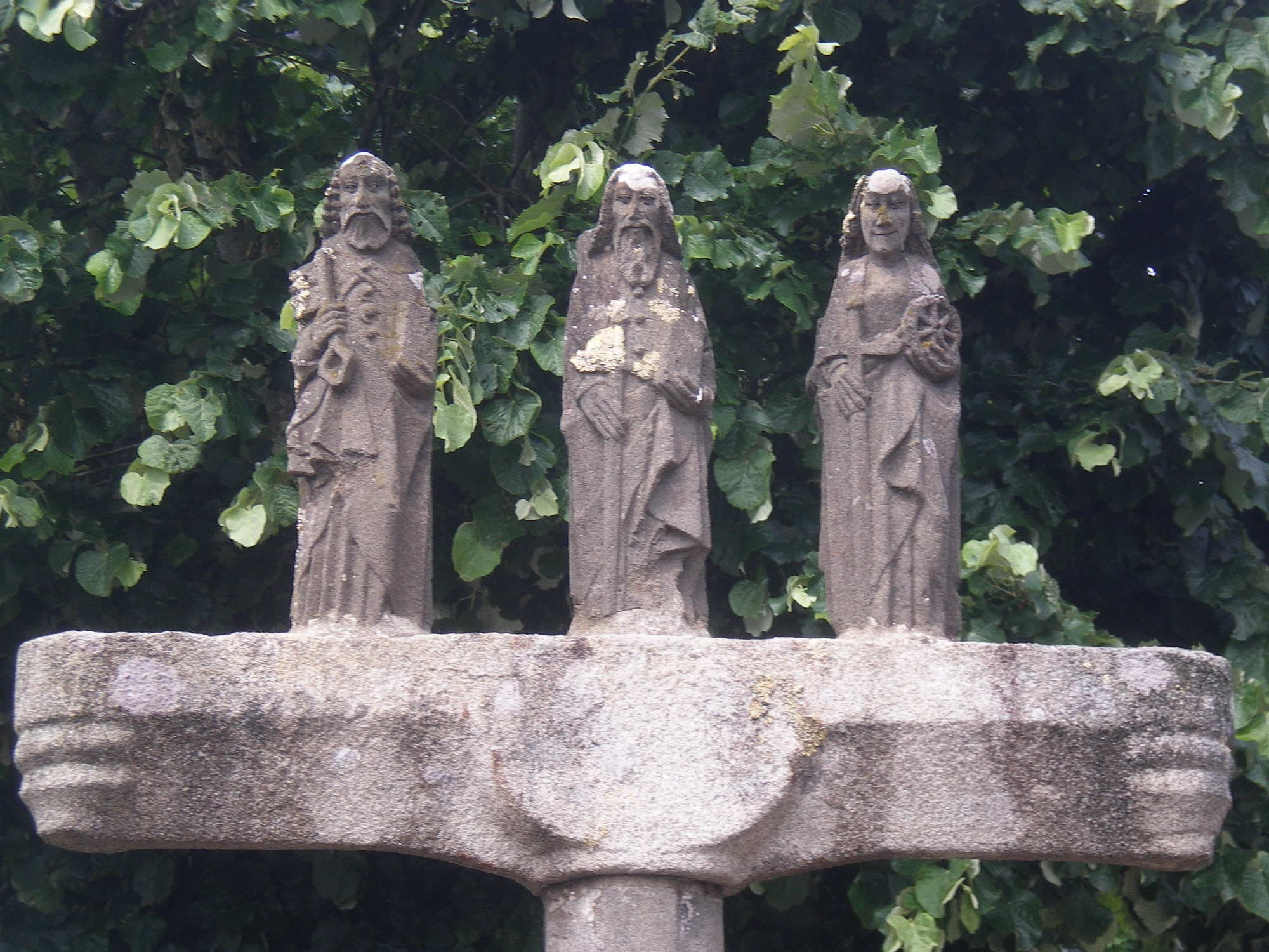 Saint Pierre, saint Paul et sainte Catherine d'Alexandrie. Personnages sculptés au sommet de la face Est du Calvaire de Quéven, attribués à Roland Doré (avant 1660).